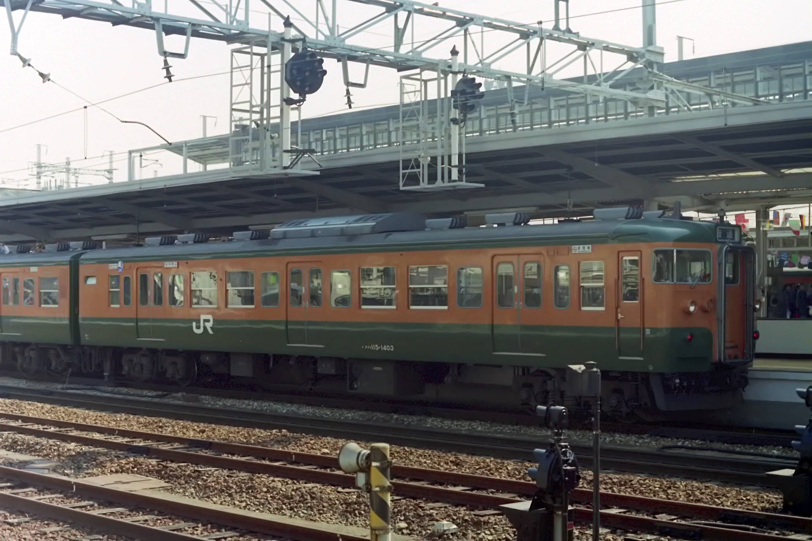 クハ115 1403 岡山駅